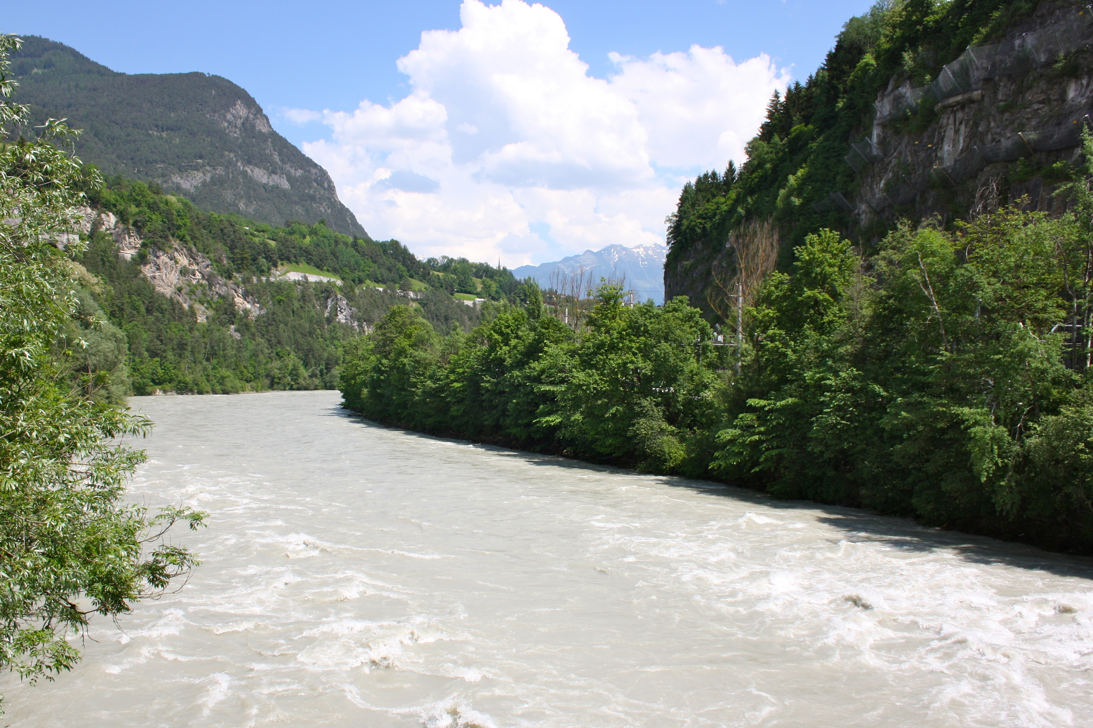 Inn stromabwärts, Ansicht von der Innbrücke der Brennbichl Landesstraße (L61).